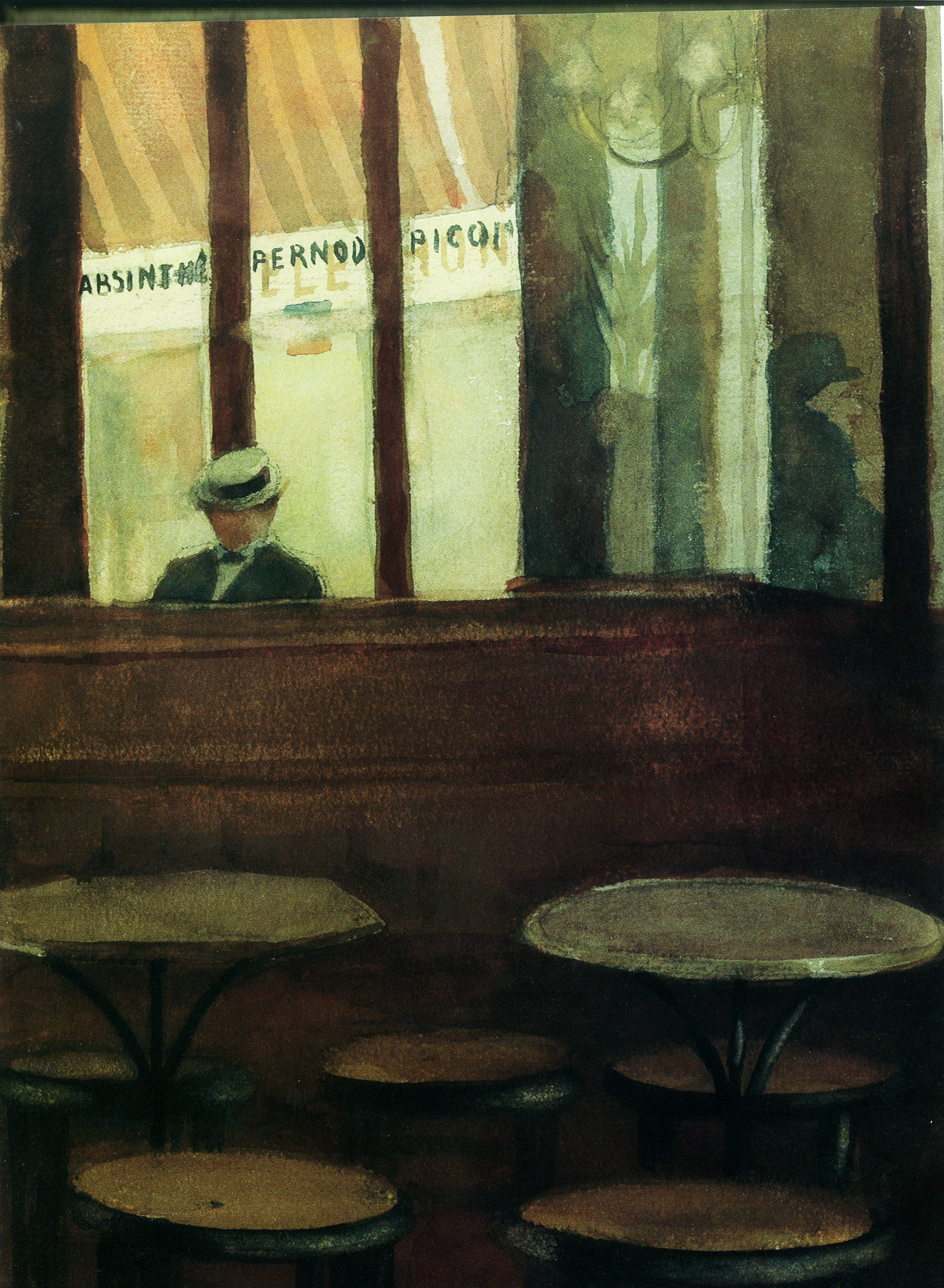 Josip Račić - U Kavani